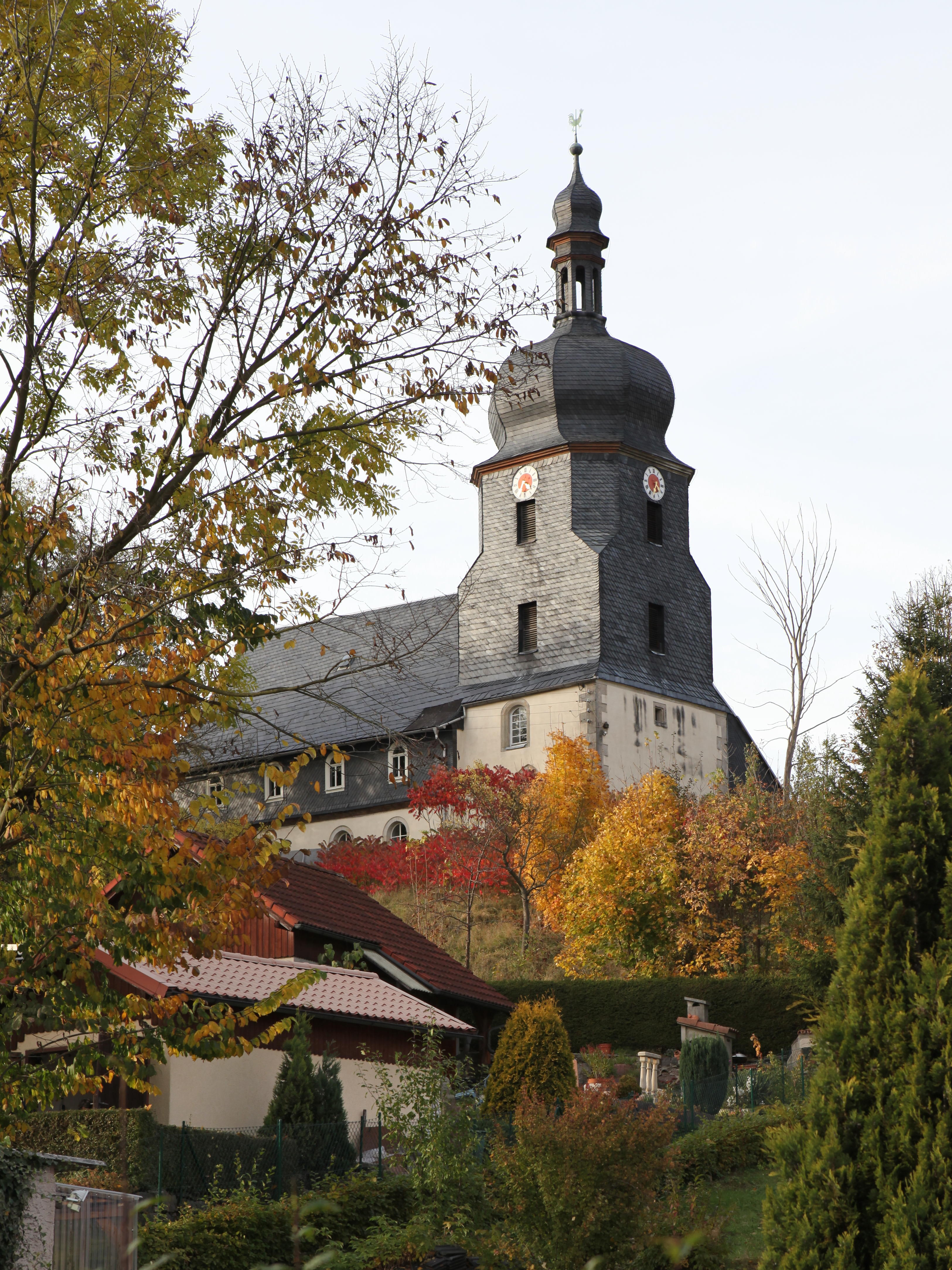 evangelisch-lutherische Kirche St. Marien, Kirchstraße 10 Heinersdorf, OT von Judenbach, Landkreis Sonneberg